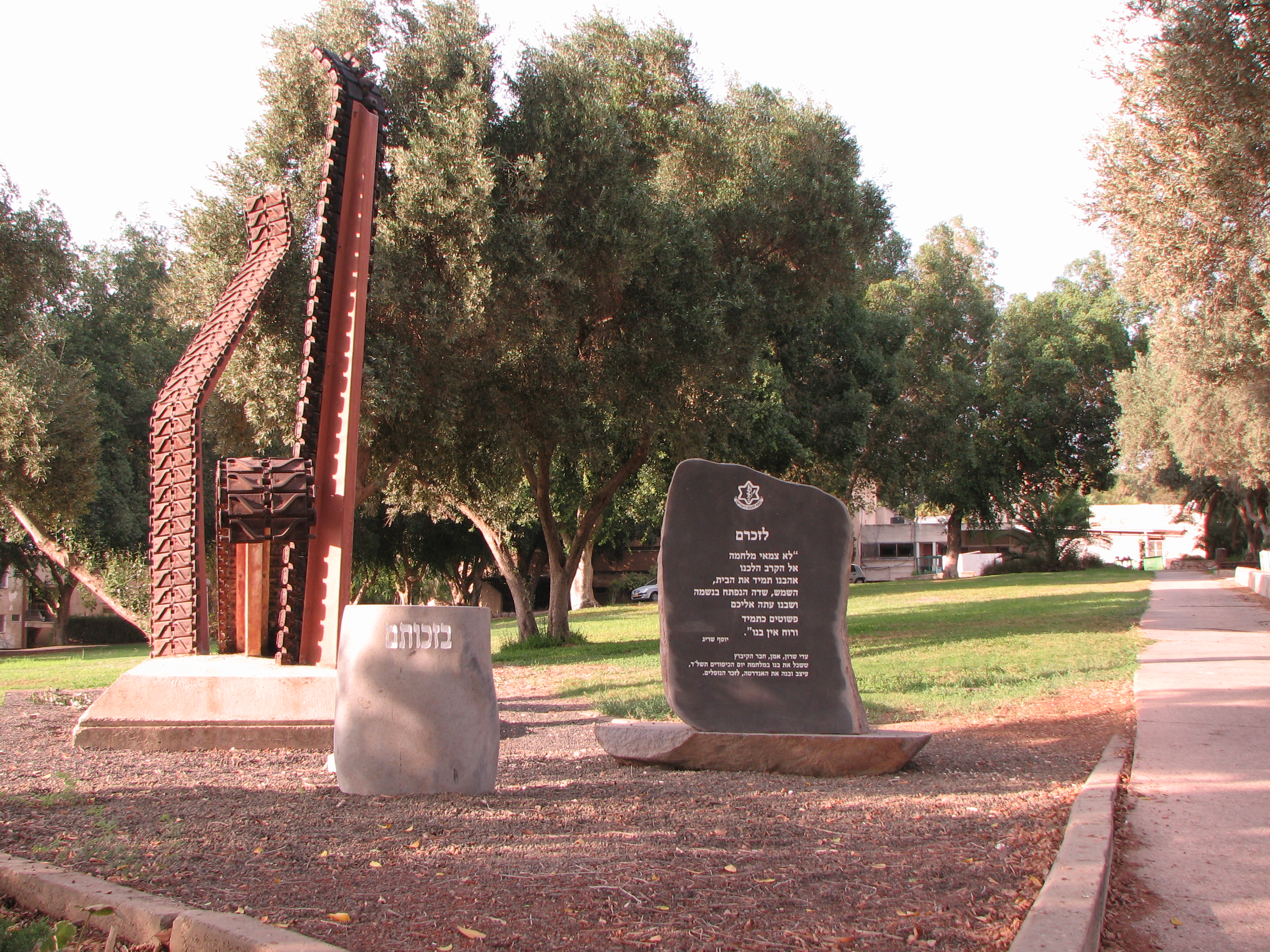 גלעד הנצחה בקיבוץ בית השיטה